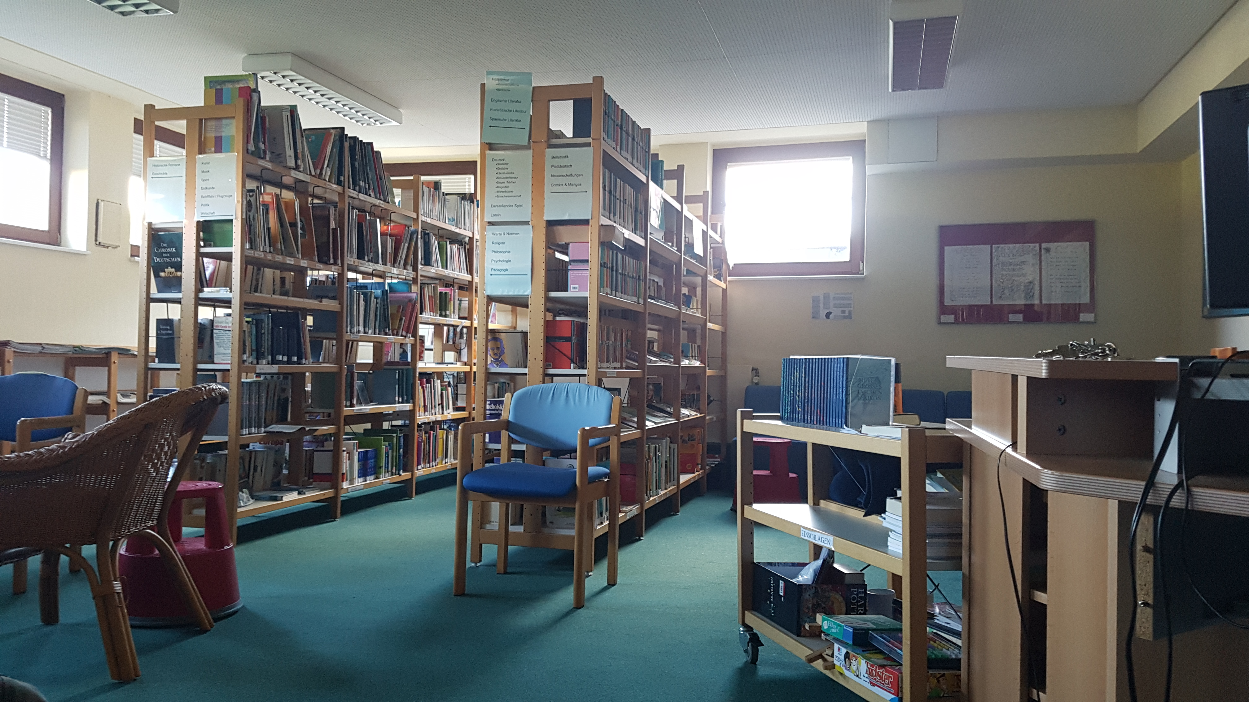 Bücherei